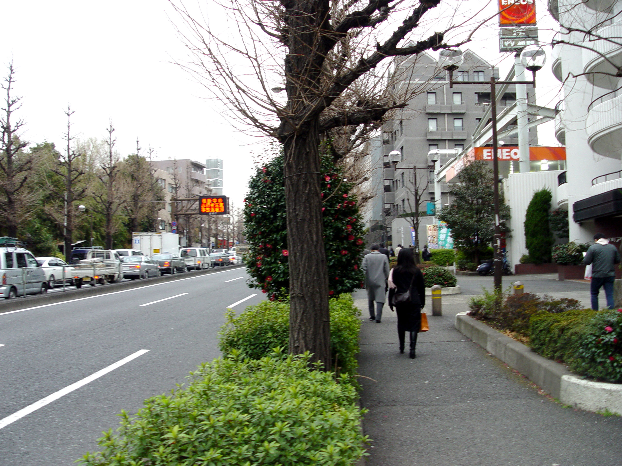 Kakinokizaka slope, Meguro, Tokyo, Japan柿の木坂